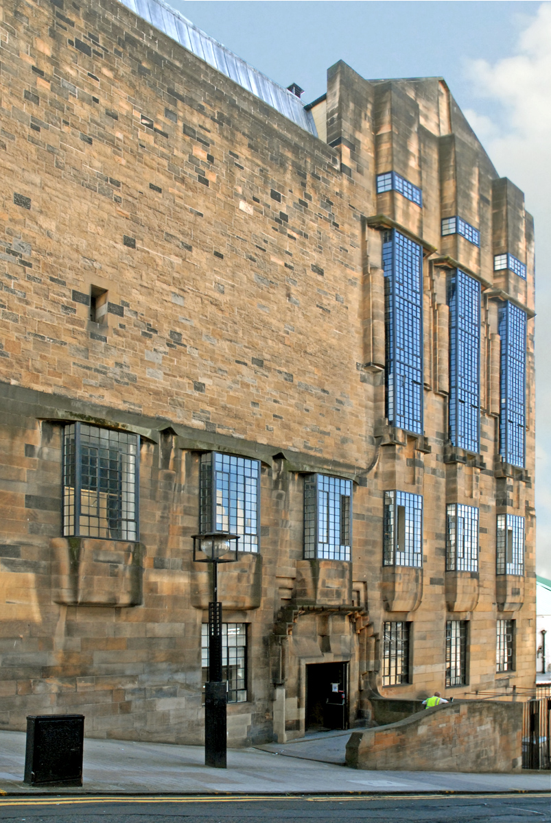 La façade ouest de la "Glasgow School of Art". Les trois fenêtres en hauteur sont celles de la bibliothèque (1907-1909) conçue par Mackintosh (y compris le mobilier), qui occupe trois étages. Charles Rennie Mackintosh (1868-1928) est un architecte, peintre et designer, né à Glasgow, qui est considéré comme un des principaux précurseurs du mouvement moderne. Avec Margaret Macdonald, qui est devenue son épouse en 1900, son ami Herbert McNair et son épouse Frances Macdonald, la soeur de Margaret, tous issus de la "Glasgow School of Art", il a constitué un groupe d'artistes très novateurs pour l'époque appelé "The Four", influencé par l'Art Nouveau, le Symbolisme et par le mouvement anglais "Arts and Crafts". En 1896, Mackintosh, alors âgé de 28 ans, a gagné le concours d'architecture du nouveau bâtiment de la "Glasgow School of Art". Ce bâtiment entièrement conçu par lui et ses collaborateurs a fondé le "Glasgow style" (art nouveau écossais), il a été construit en deux étapes. L'aile ouest a été terminée en 1910, elle comprend la bibliothèque considérée avec la façade du bâtiment comme le chef-d'oeuvre de Mackintosh.